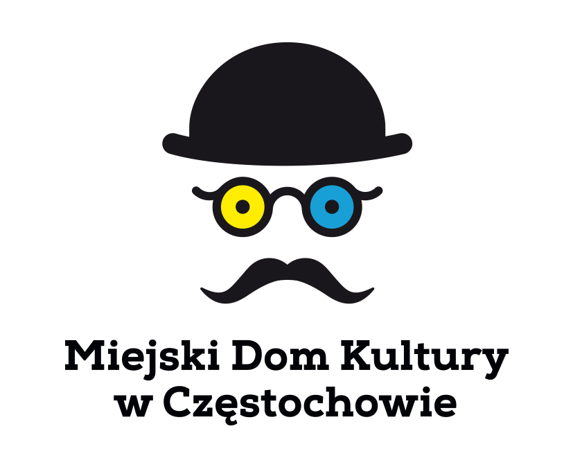 Logo Miejskiego Domu Kultury w Częstochowie